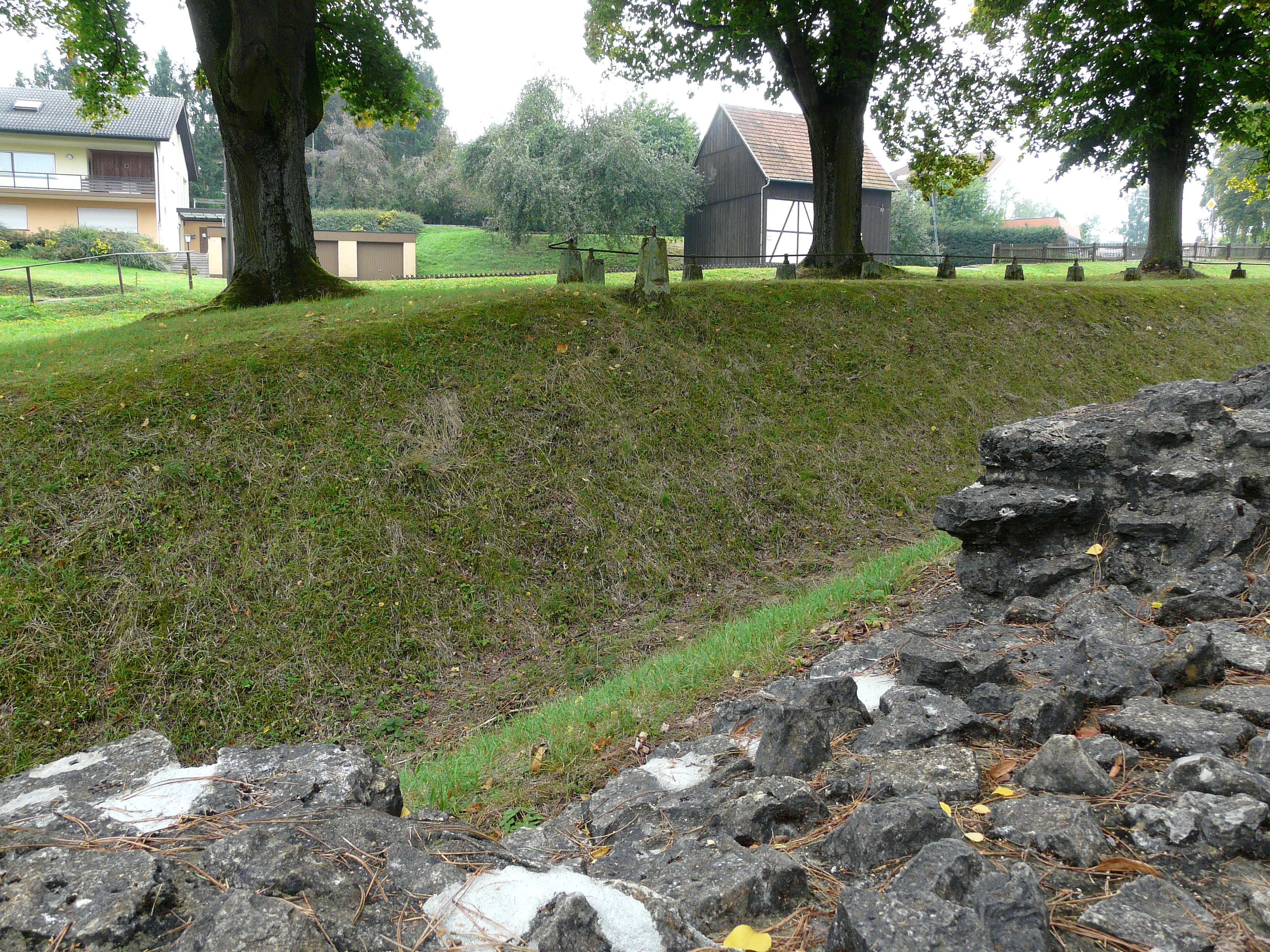 SO-Eckturm mit Spitzgraben des Annexkastells des Kastells Osterburken (ORL 40) am Obergermanischen Limes